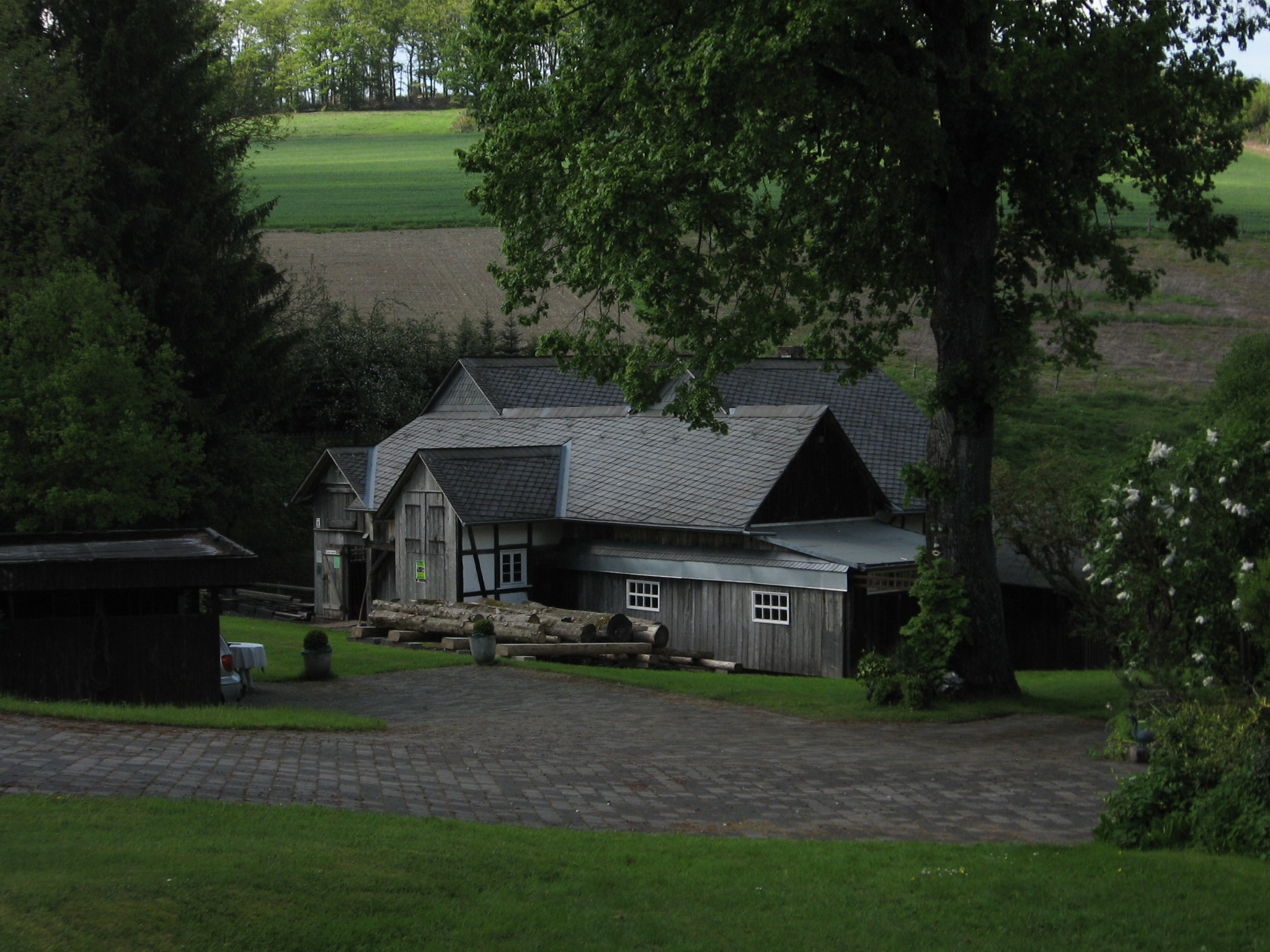 Sägemühle Remblinghausen von Südosten aus gesehen.